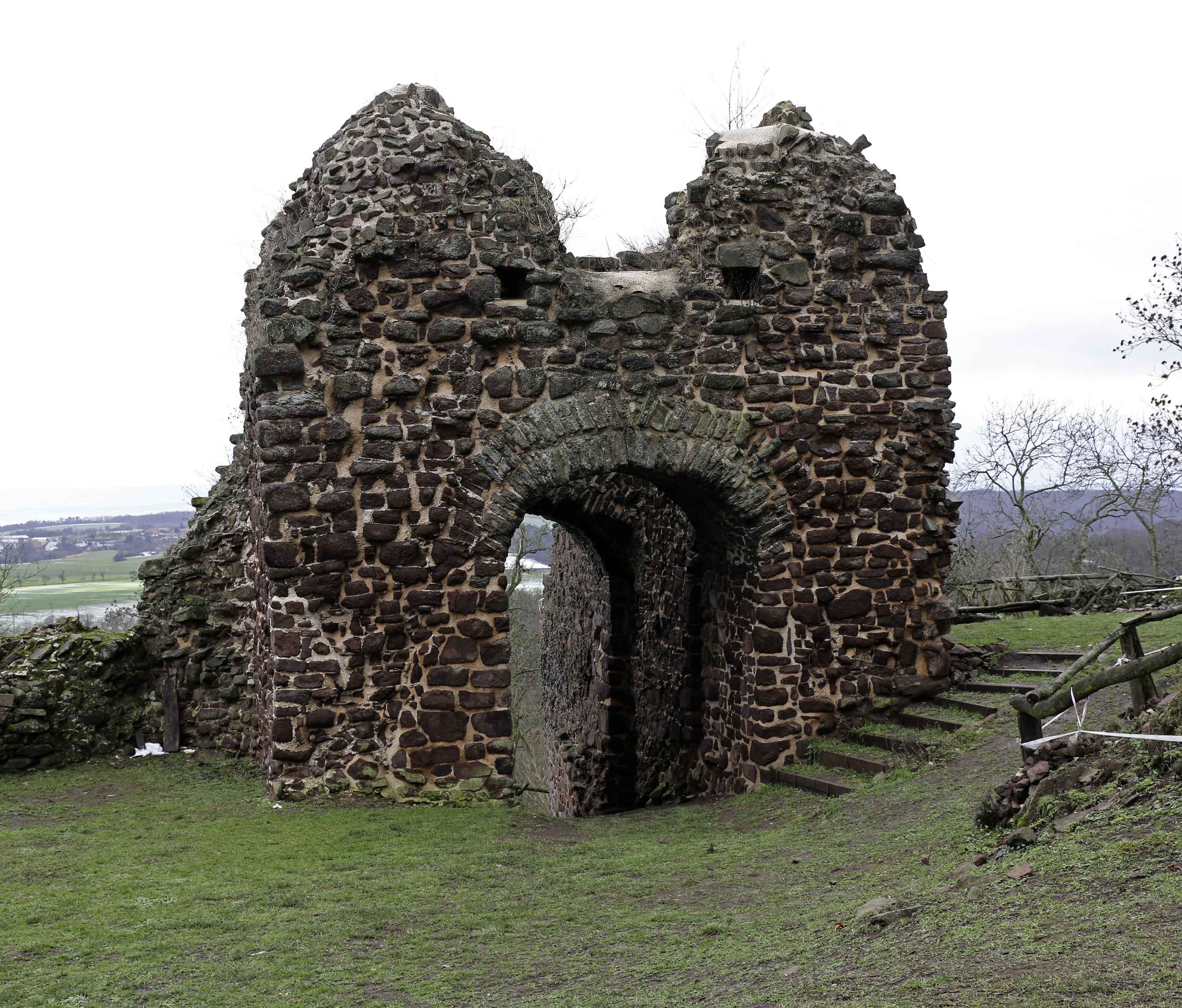 Tor der Ebersburg (Harz)